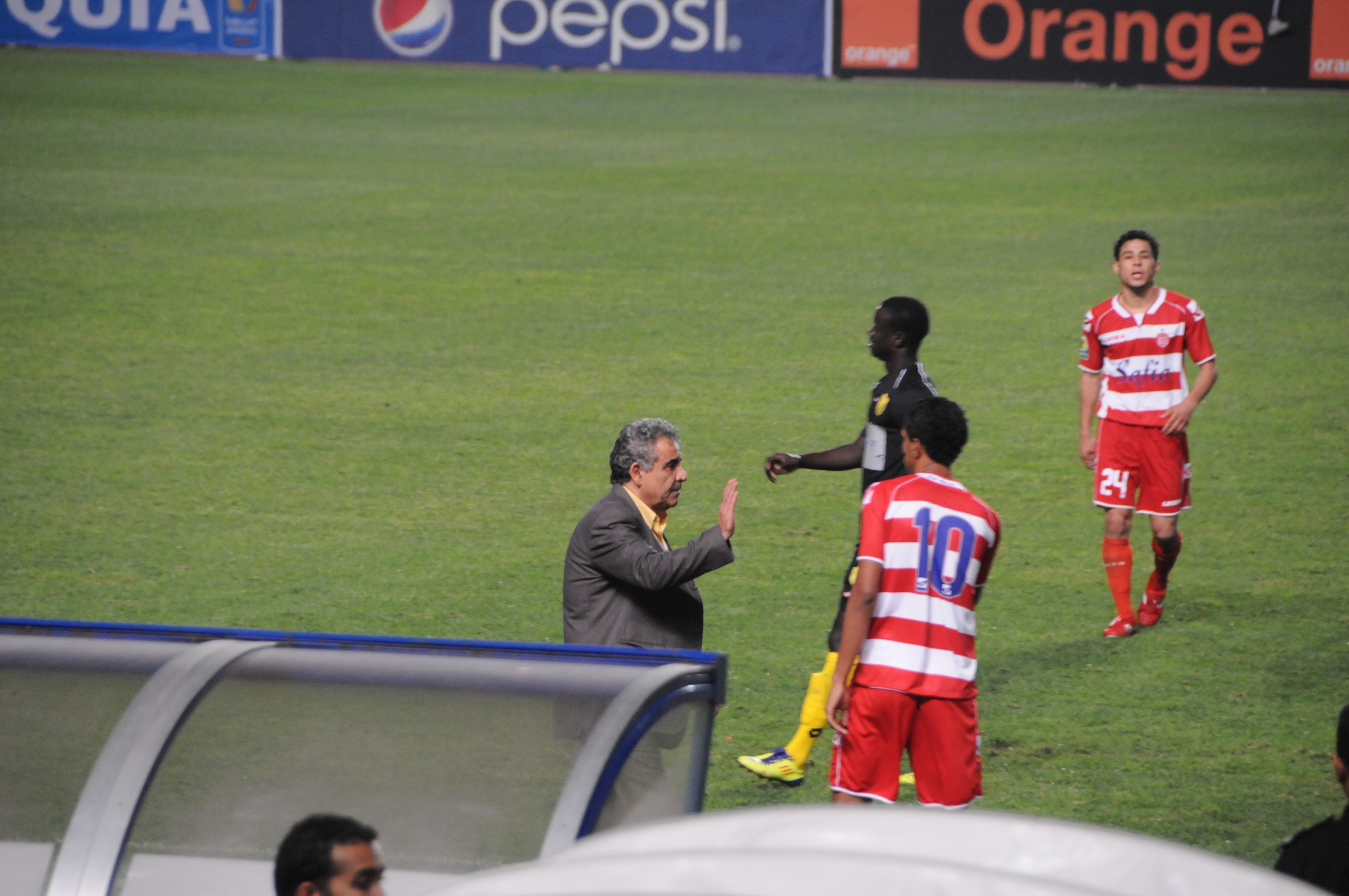 Match de la ligue d'Afrique de Football entre le CA tunisien et le MAS marocain de Fès.